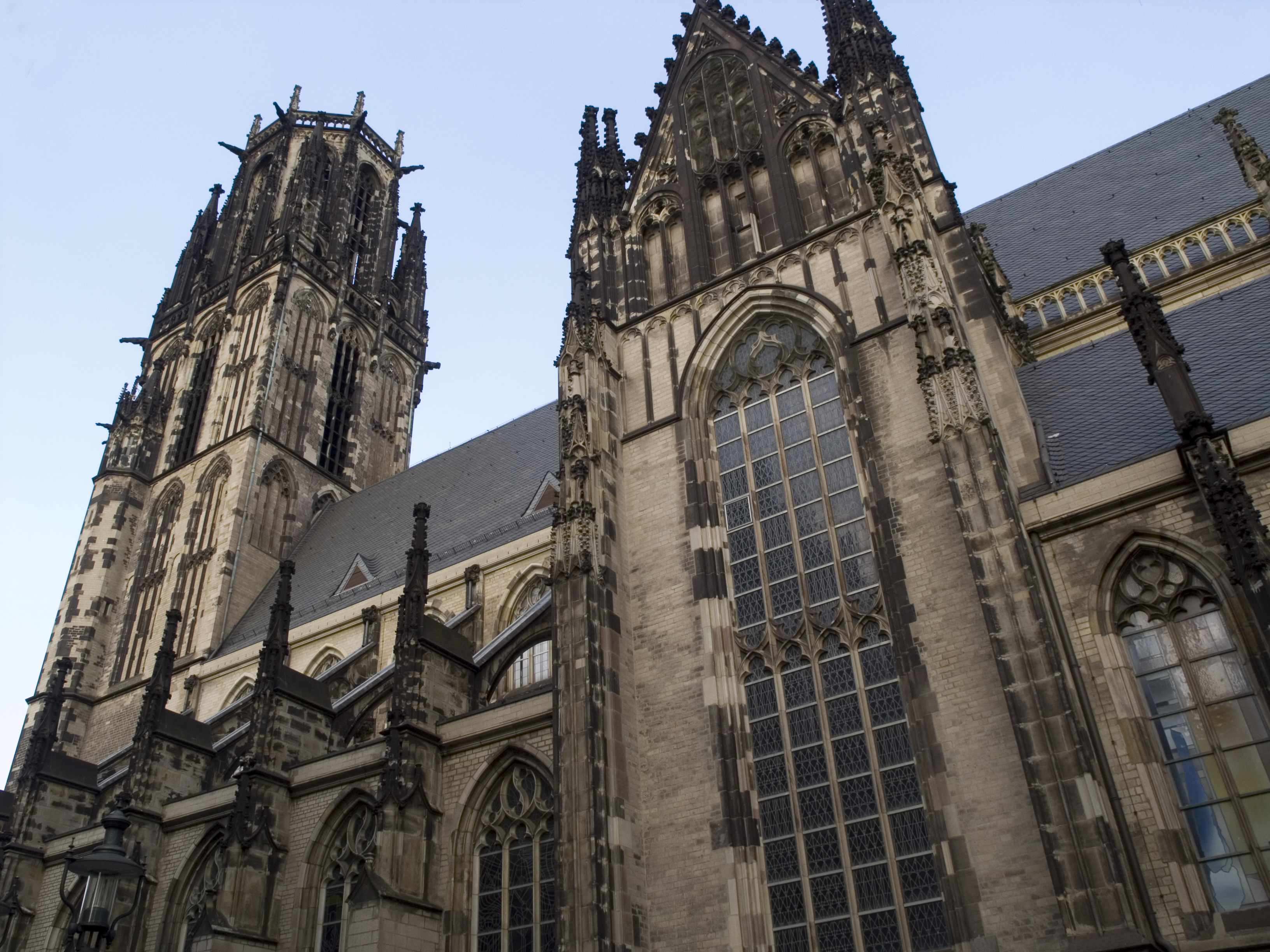 Северный Рейн - Вестфалия, Дуйсбург - церковь Спасителя